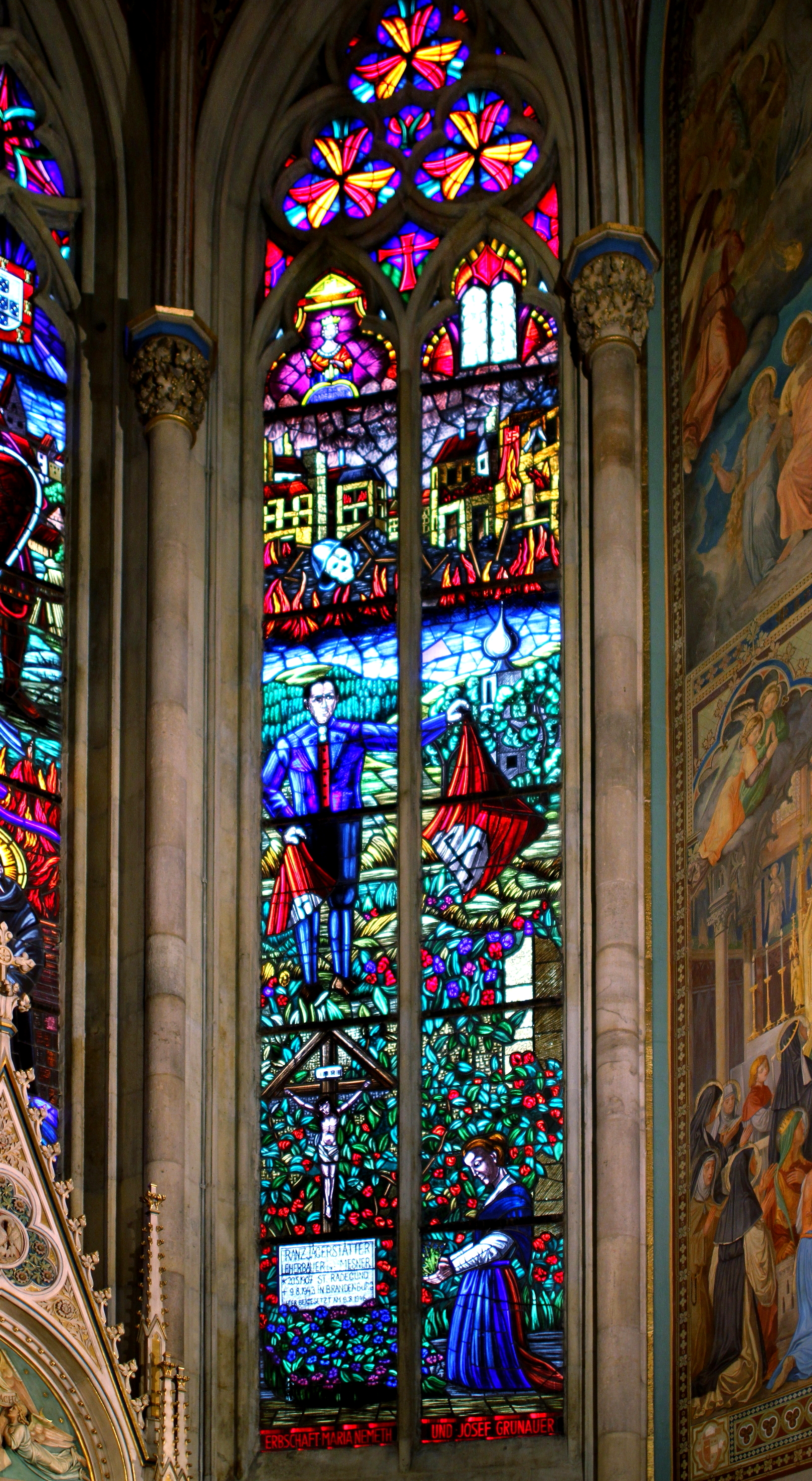 Ein dem Franz Jägerstätter gewidmetes Fenster in der Kreuzkapelle der Wiener Votivkirche. Dies war das erste Sakralkunstwerk, das das Martyrium des oberösterreichischen Kriegsdienstverweigerers aufgegriffen hat.